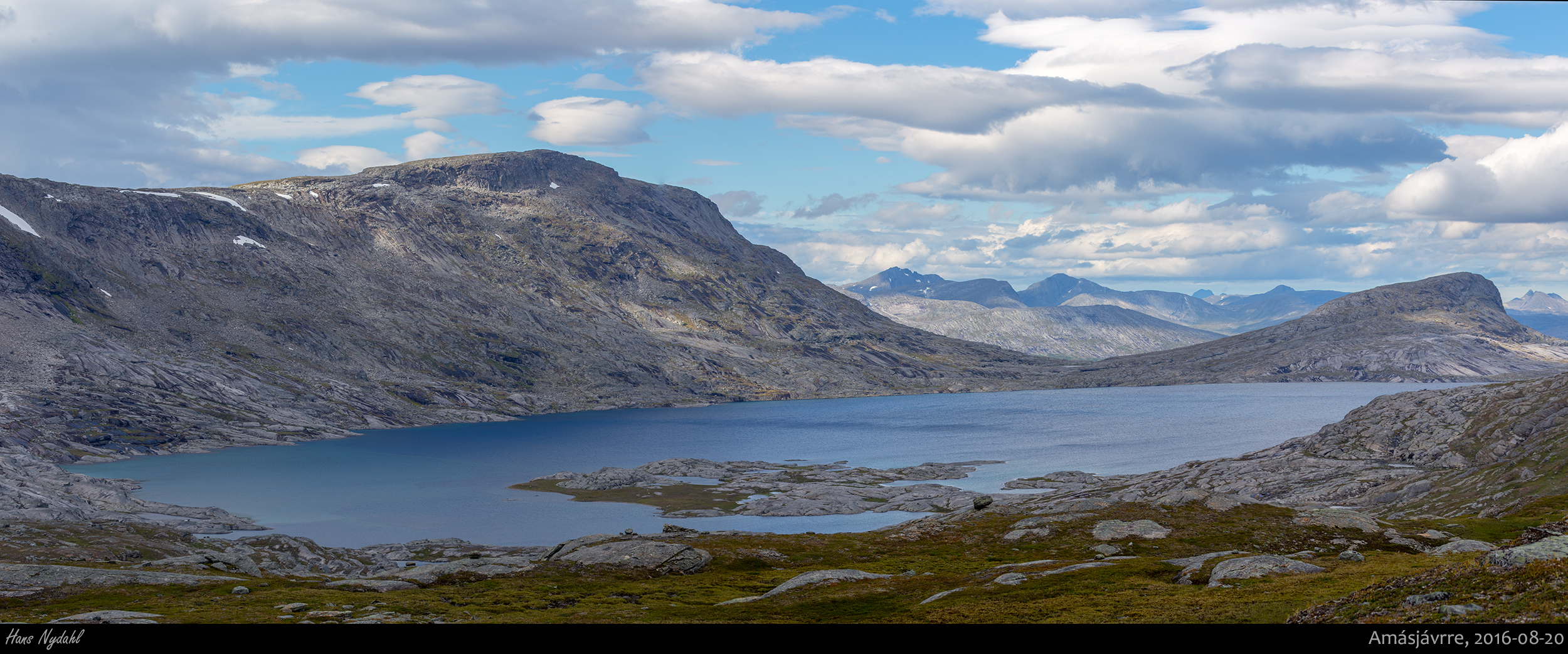 Vy mot Amásjávrre från södra sidan av Tjårok. Halvön mitt i bild ligger på svenska sidan av gränsen.